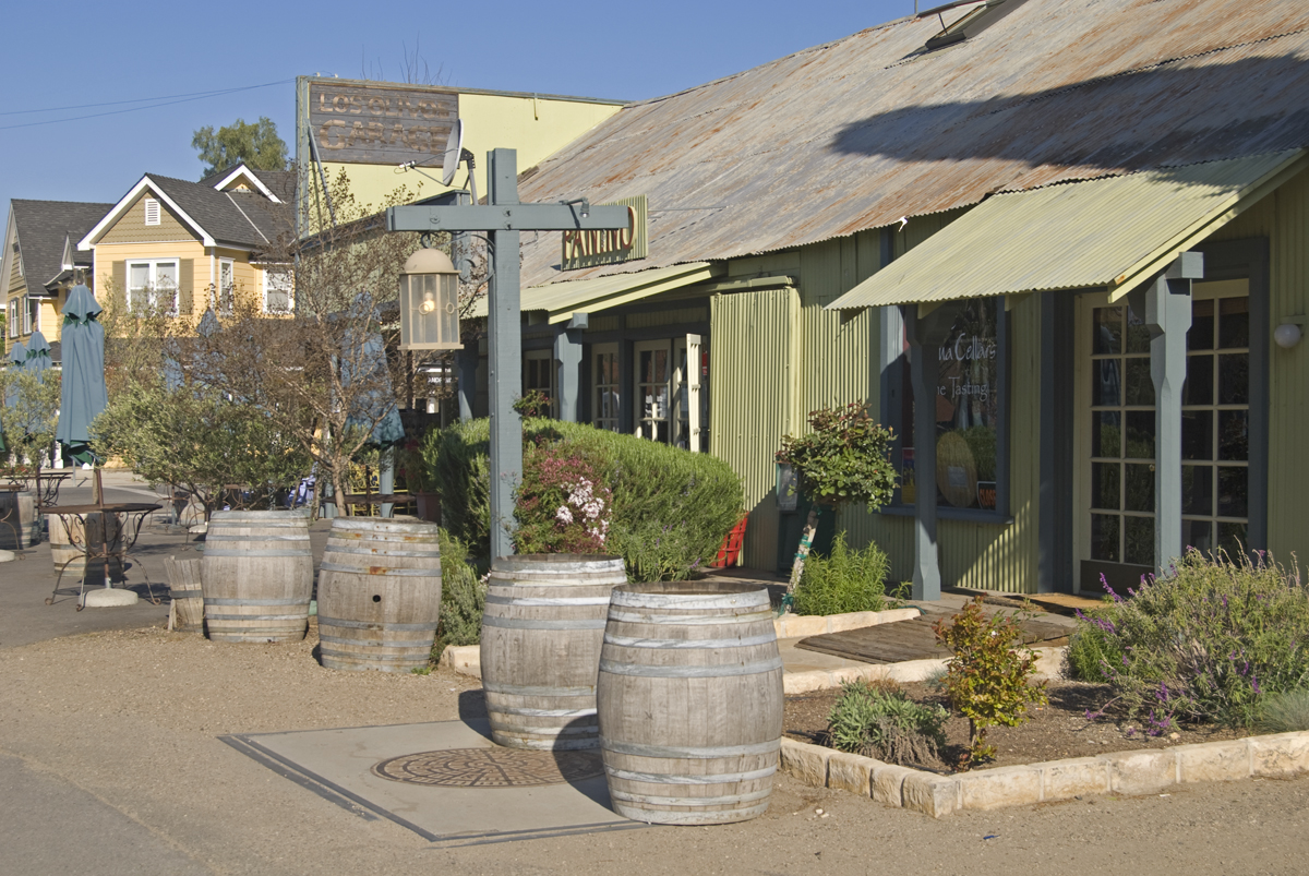 Los Olivos